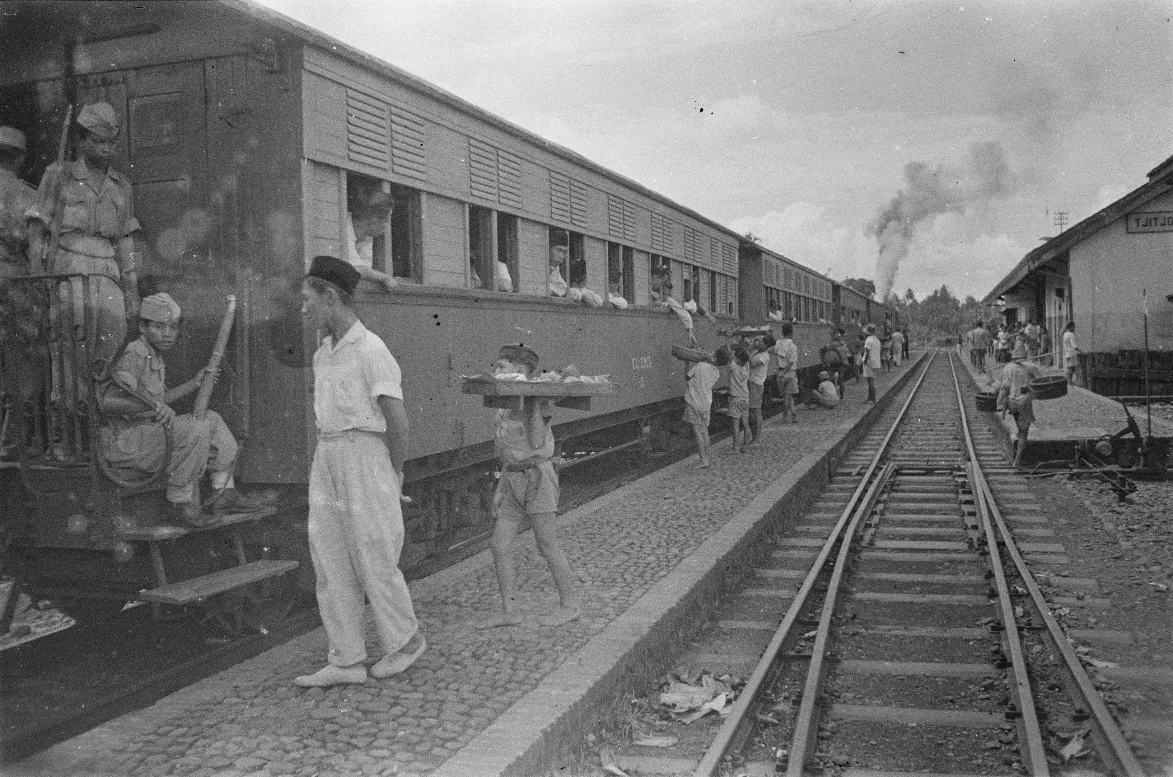 Collectie / Archief : Fotocollectie Dienst voor Legercontacten Indonesië Reportage / Serie : [ onbekend ] Beschrijving : Op het treinstation van Tjitjoroeg (bij Soekaboemi) verkopen jonge kinderen etenswaren aan treinreizigers Datum : 3 december 1947 Locatie : Cicurug, Indonesië, Nederlands-Indië, Sukabumi Fotograaf : Steggerda, Harry / DLC Auteursrechthebbende : Nationaal Archief Materiaalsoort : Negatief (zwart/wit) Nummer archiefinventaris : bekijk toegang 2.24.04.03 Bestanddeelnummer : 447-2-4